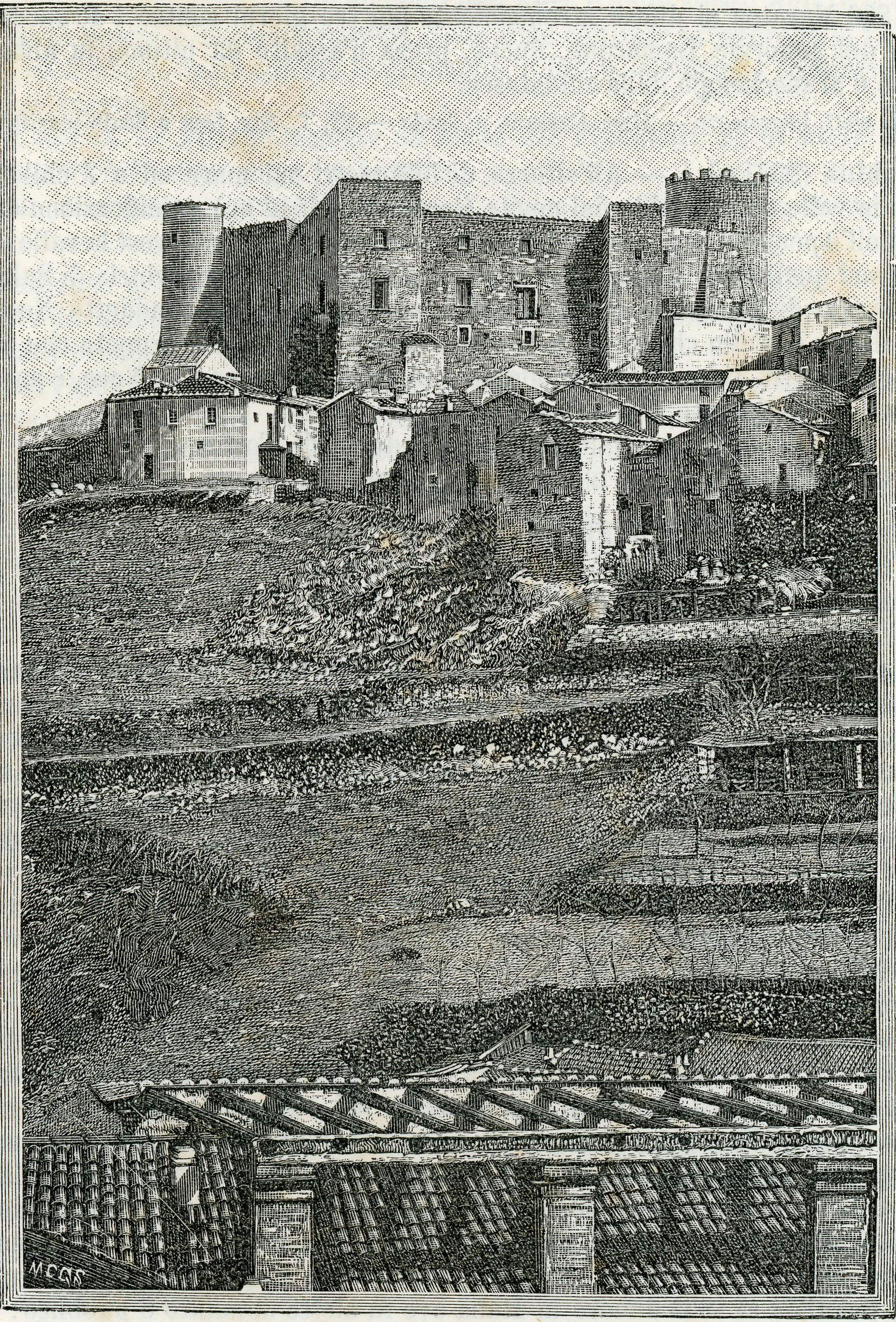 Moliterno: veduta del castello, (xilografia di MCGS).